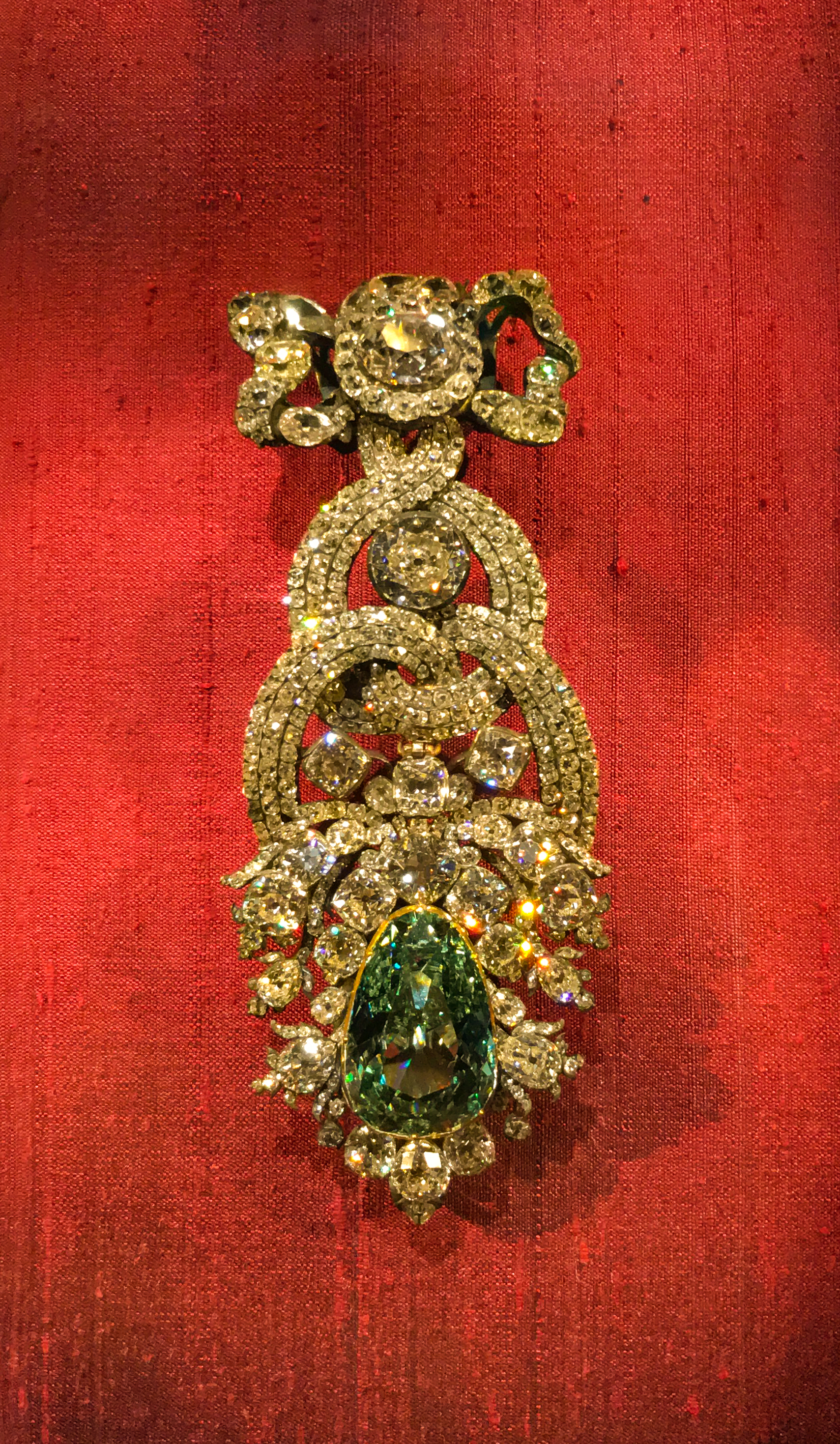 Dresdner Grüner Diamant – Neues Grünes Gewölbe Dresden